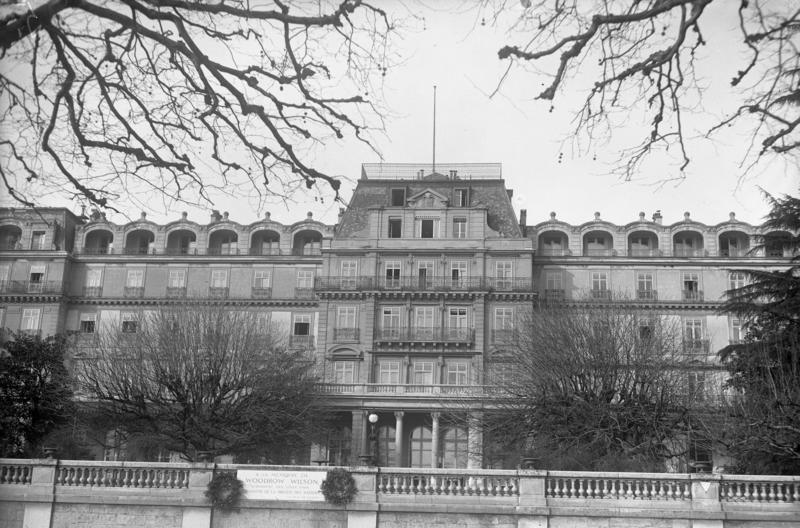 Hier wird über den deutsch-polnischen Conflikt verhandelt! Das Haus des Völkerbundrates in Genf, wo die deutsch-polnischen Streitigkeiten geschlichtet werden.